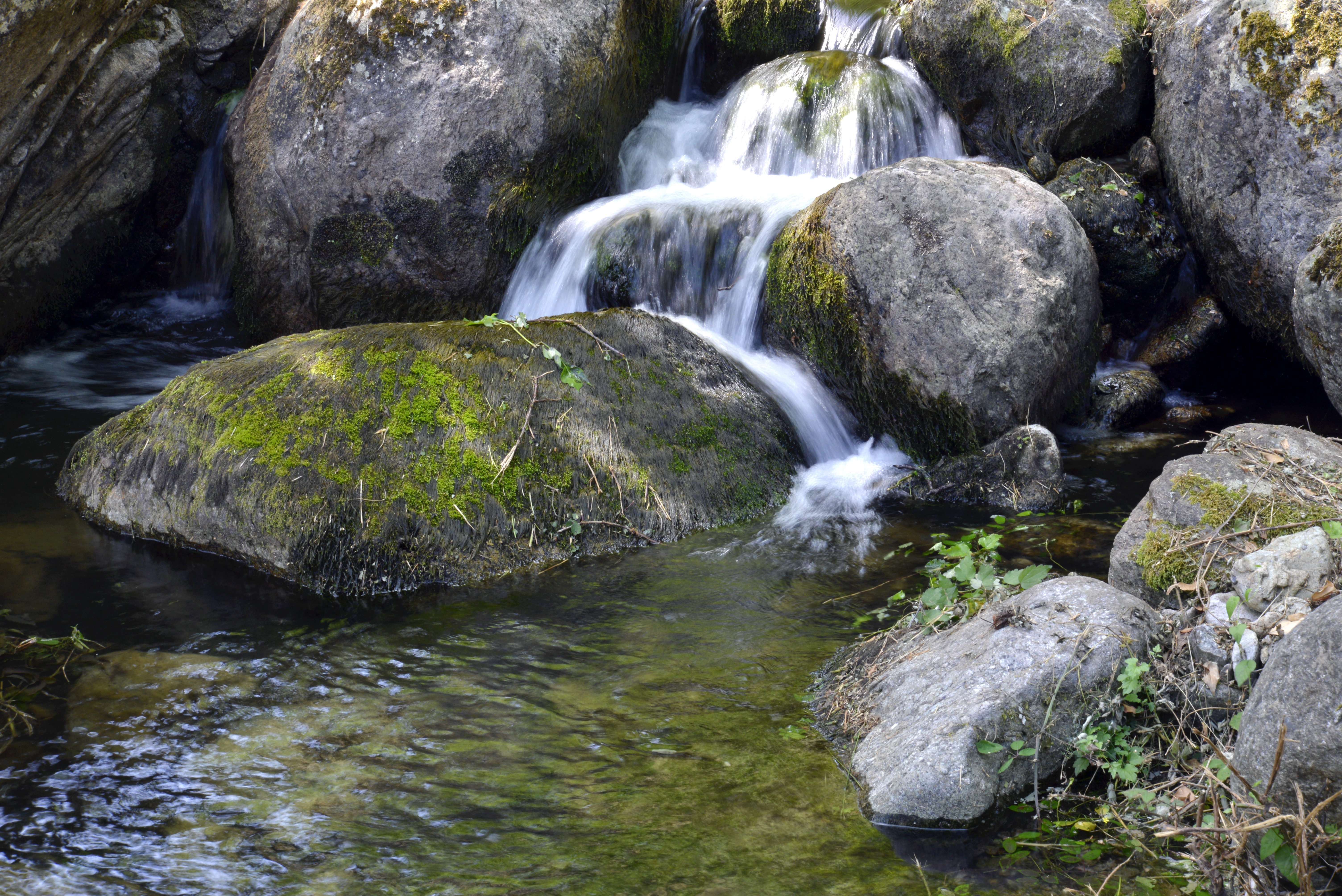 Santo-Pietro-di-Venaco, Centre Corse - Le Misognu (Misongno) dans sa traversée du village.